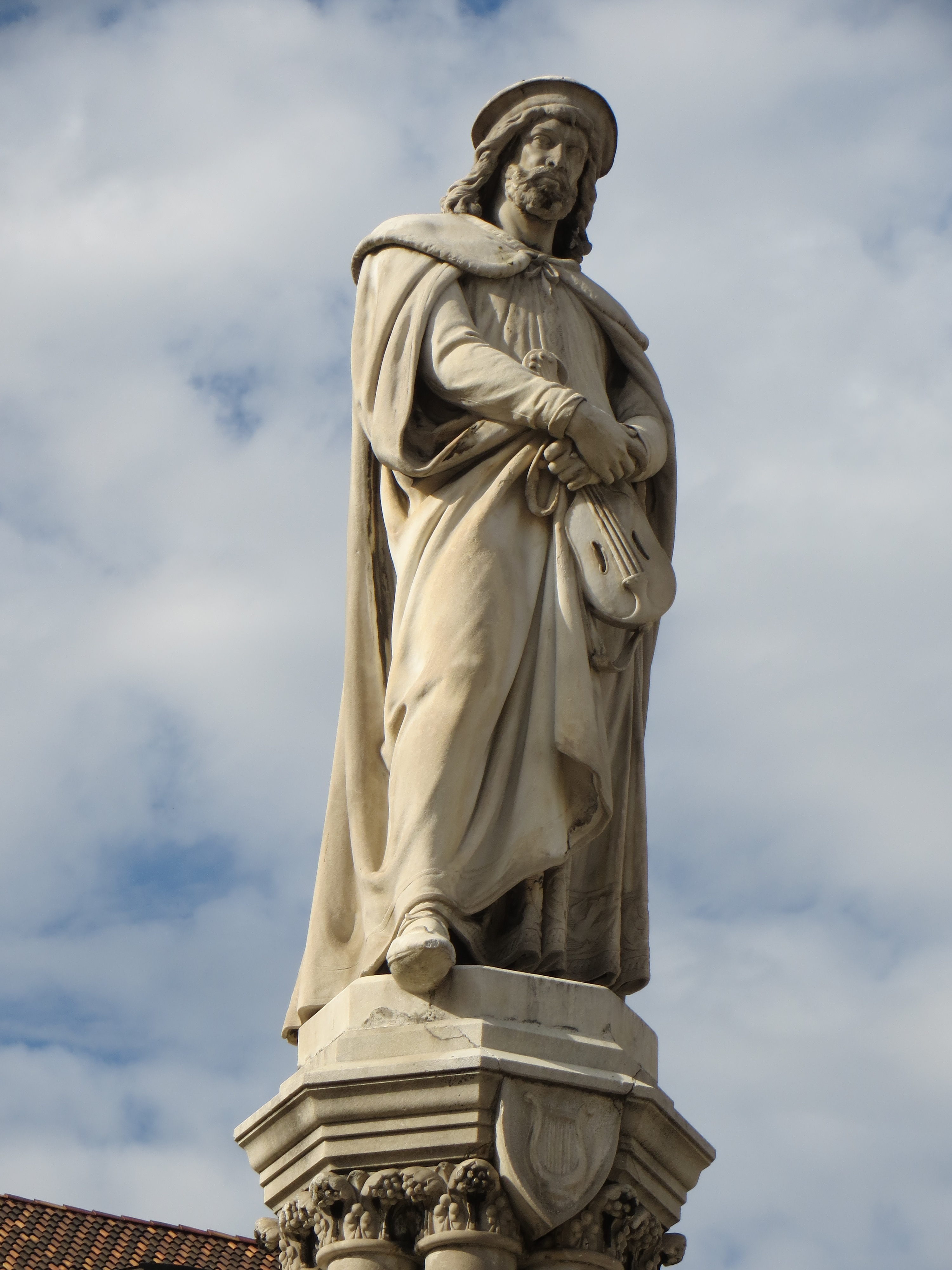 Waltherdenkmal Bozen/Bolzano